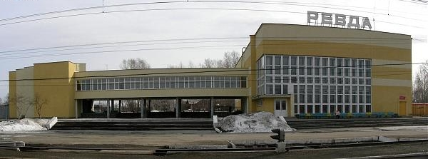 Вокзал ст. Ревда Свердловской ж.д.